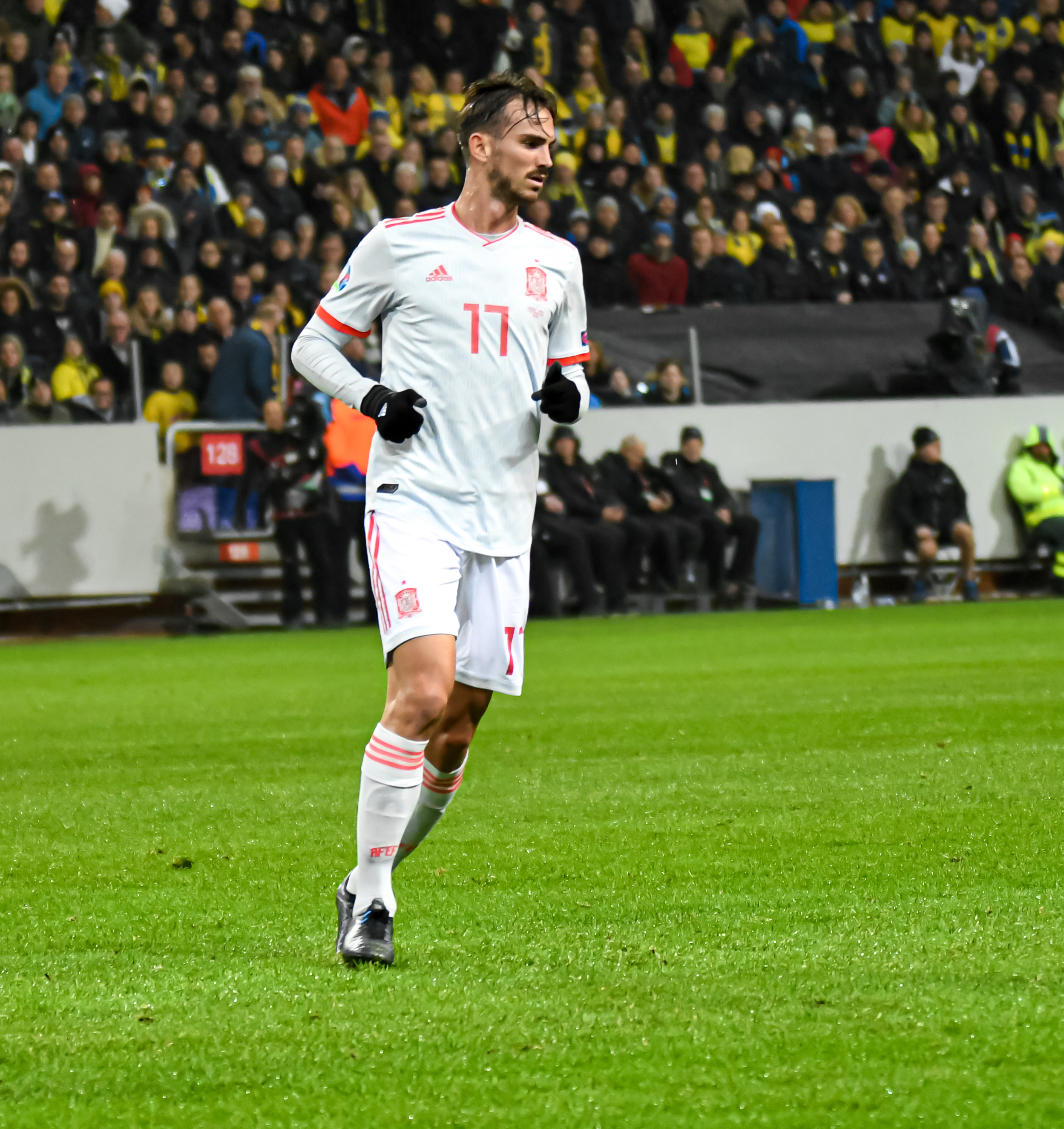 UEFA EURO qualifiers Sweden vs Spain 20191015